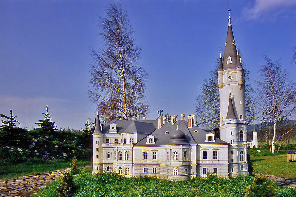 Kowary - Park Miniatur Zabytków Dolnego Śląska - Pałac w Bożkowie